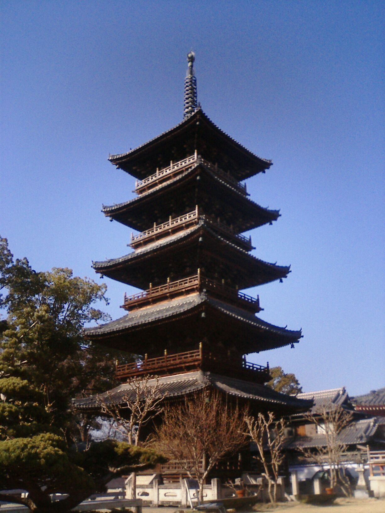 本山寺五重塔 - 日本国香川県三豊市